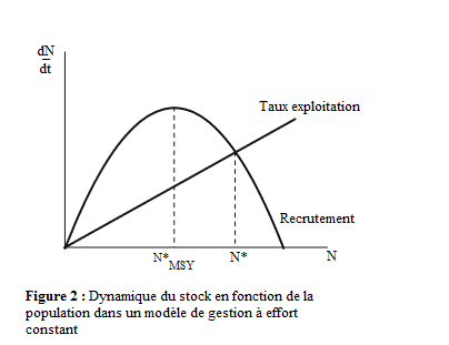 Description de la densité du stock